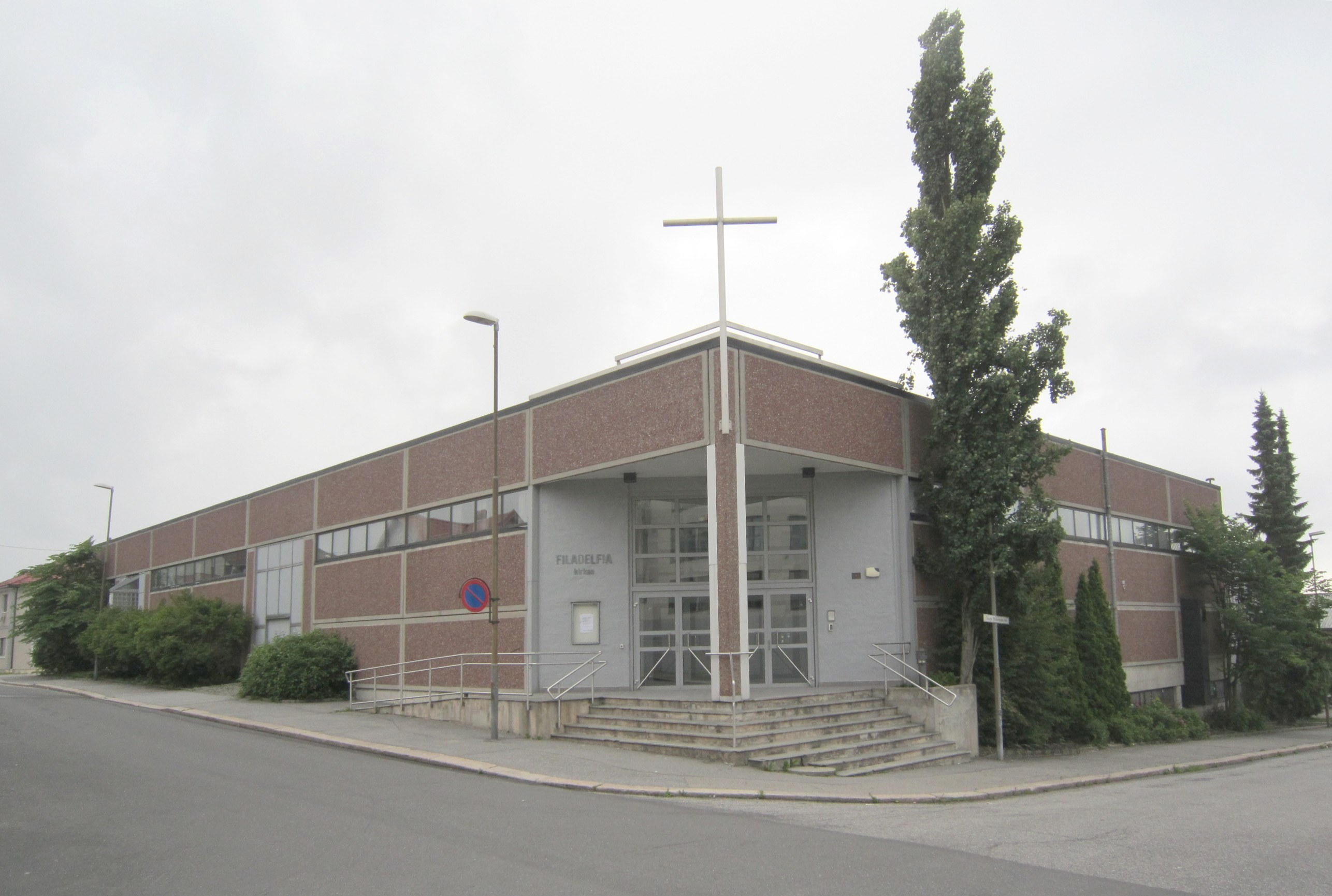 Filadelfiakirken Sarpsborg